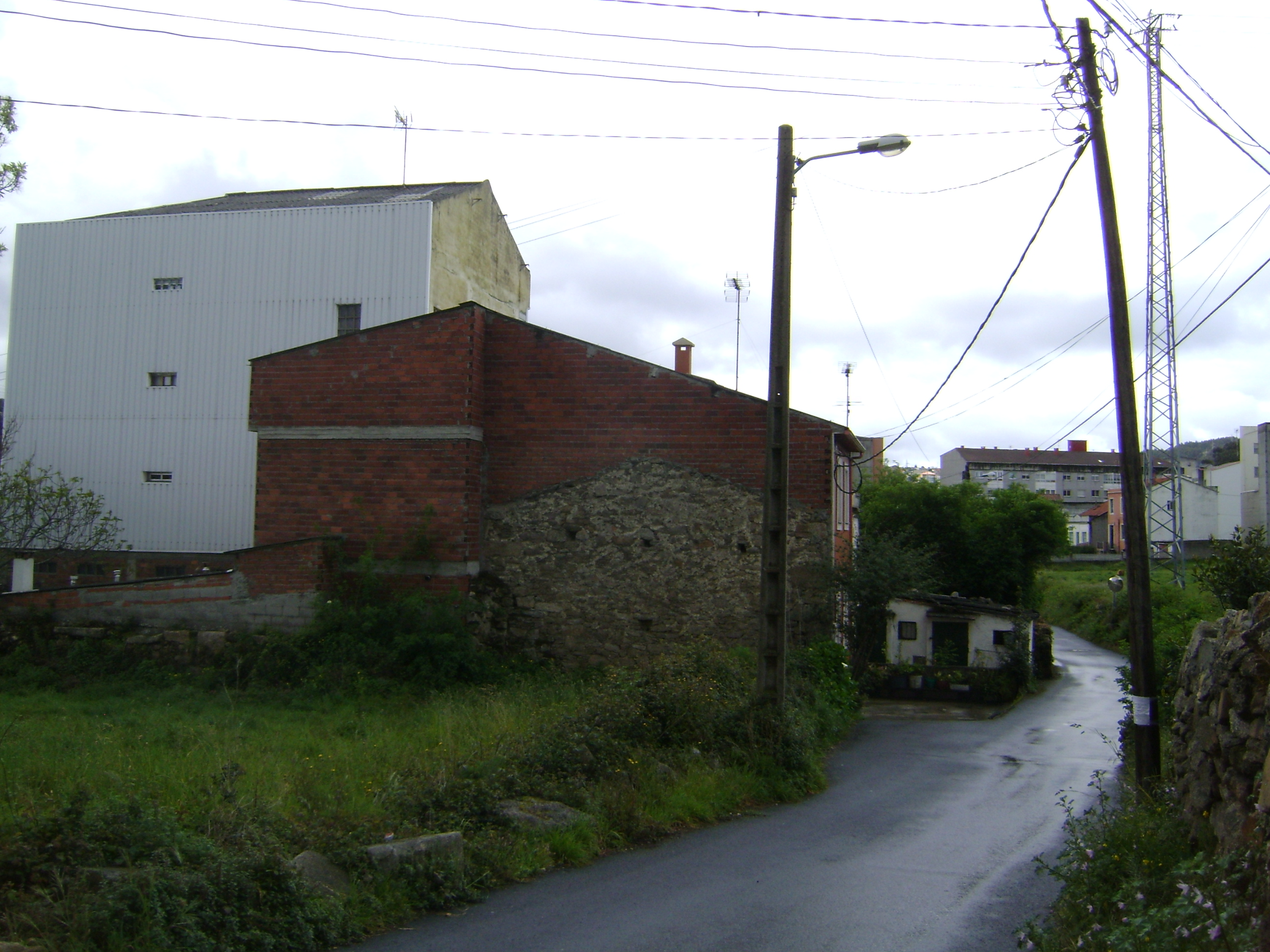 Feismo